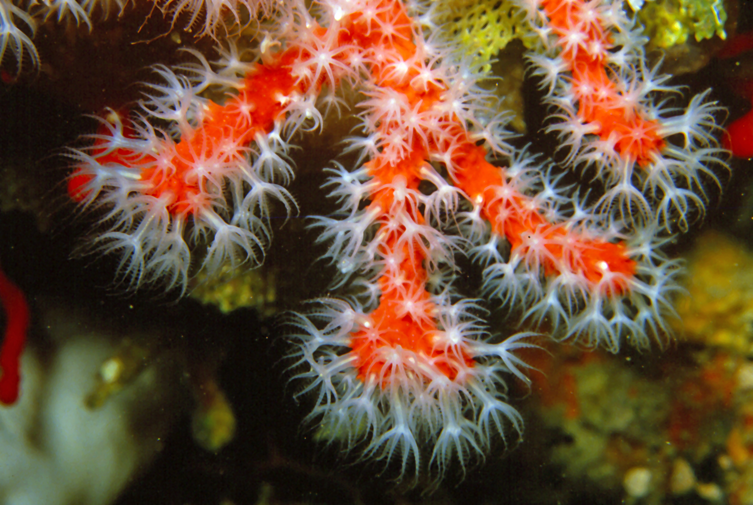 Corallium rubrum (Linnaeus, 1758) - Banyuls-sur-Mer, Sec de Rédéris : 08/84